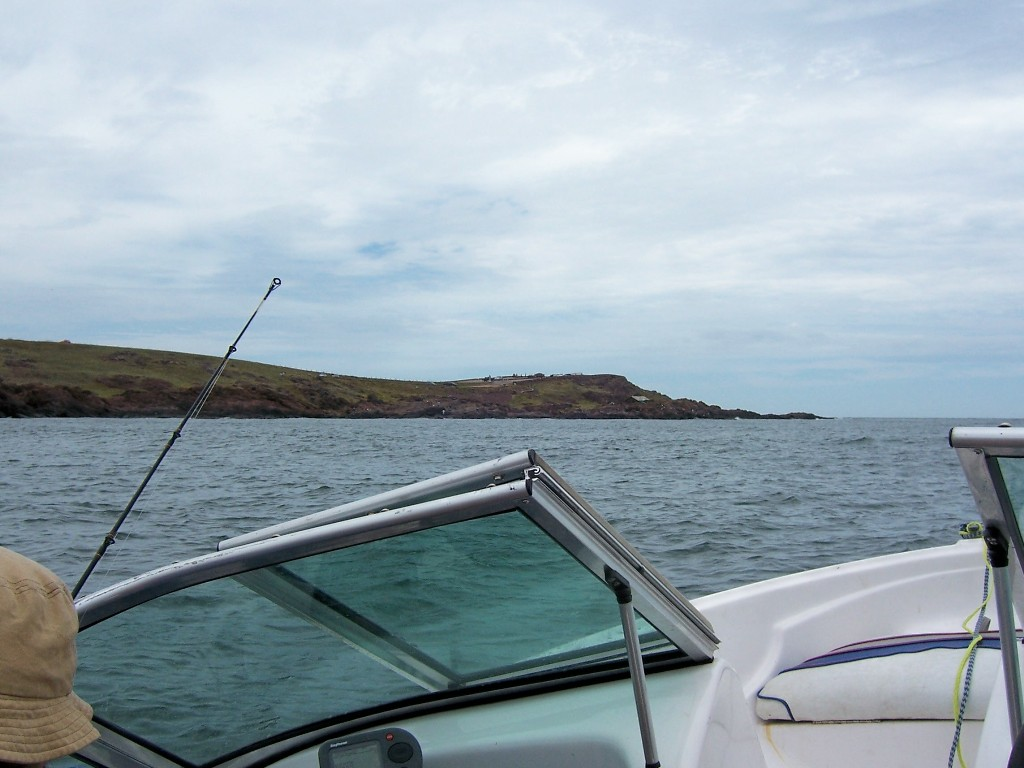 Punta Ballena, Departamento de Maldonado, Uruguay.